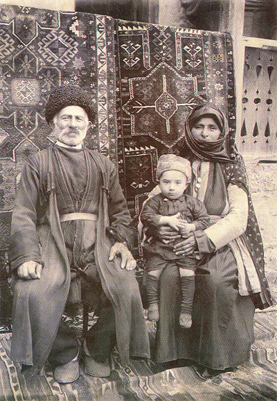 Армянская семья из села Ванк (Арцах-Карабах)